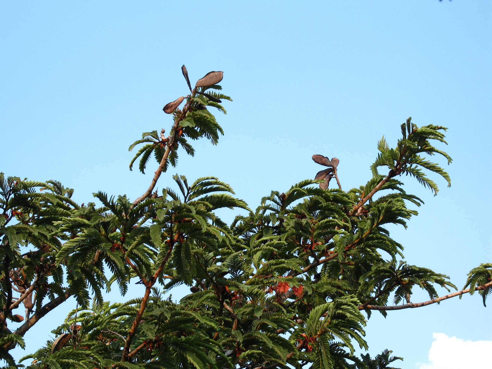 Brachystegia boehmii, taken in Harare, Zimbabwe.